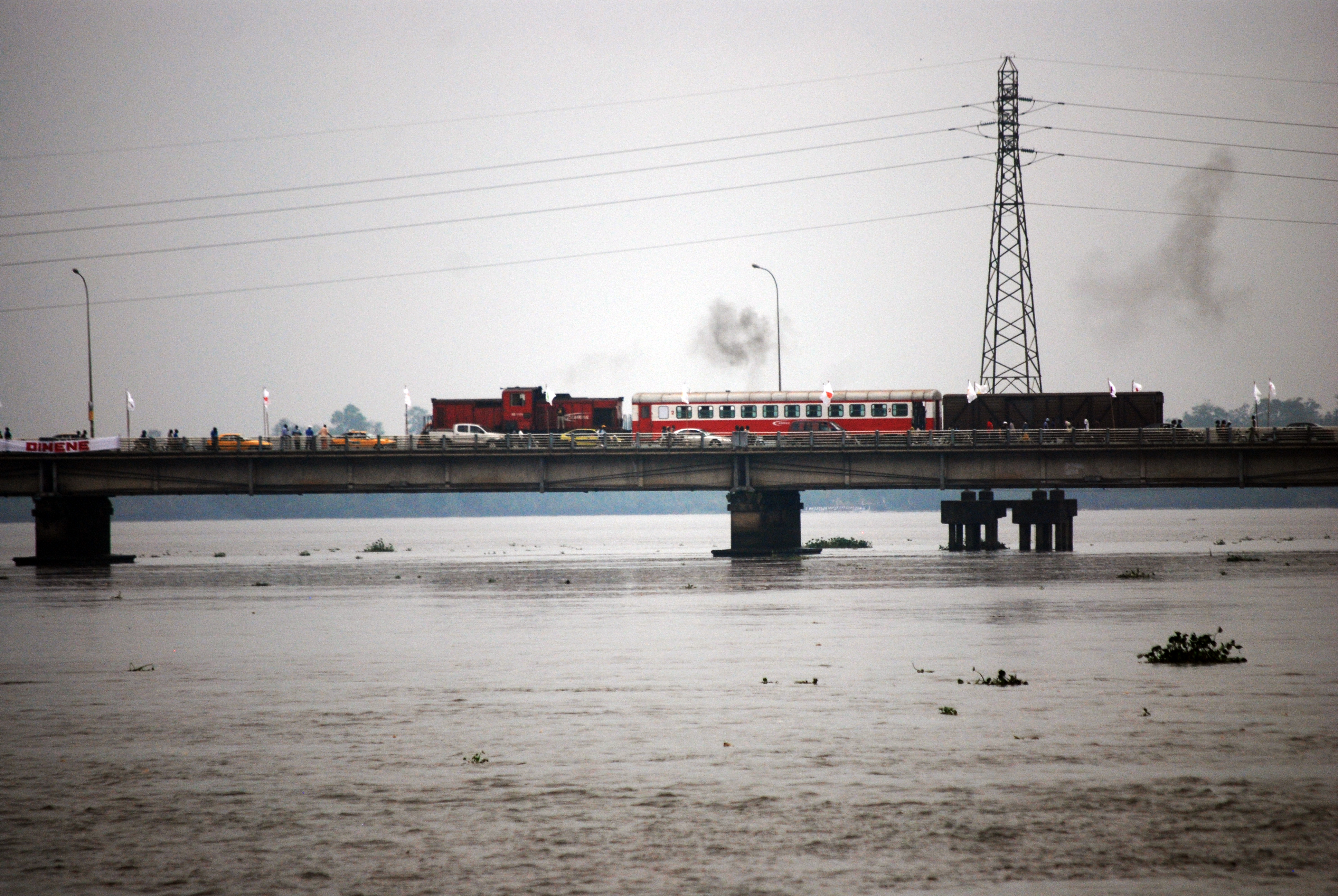 Un train traversant l'ancien pont sur le fleuve Wouri à Douala This is an image with the theme "Africa on the Move or Transport" from: Cameroon